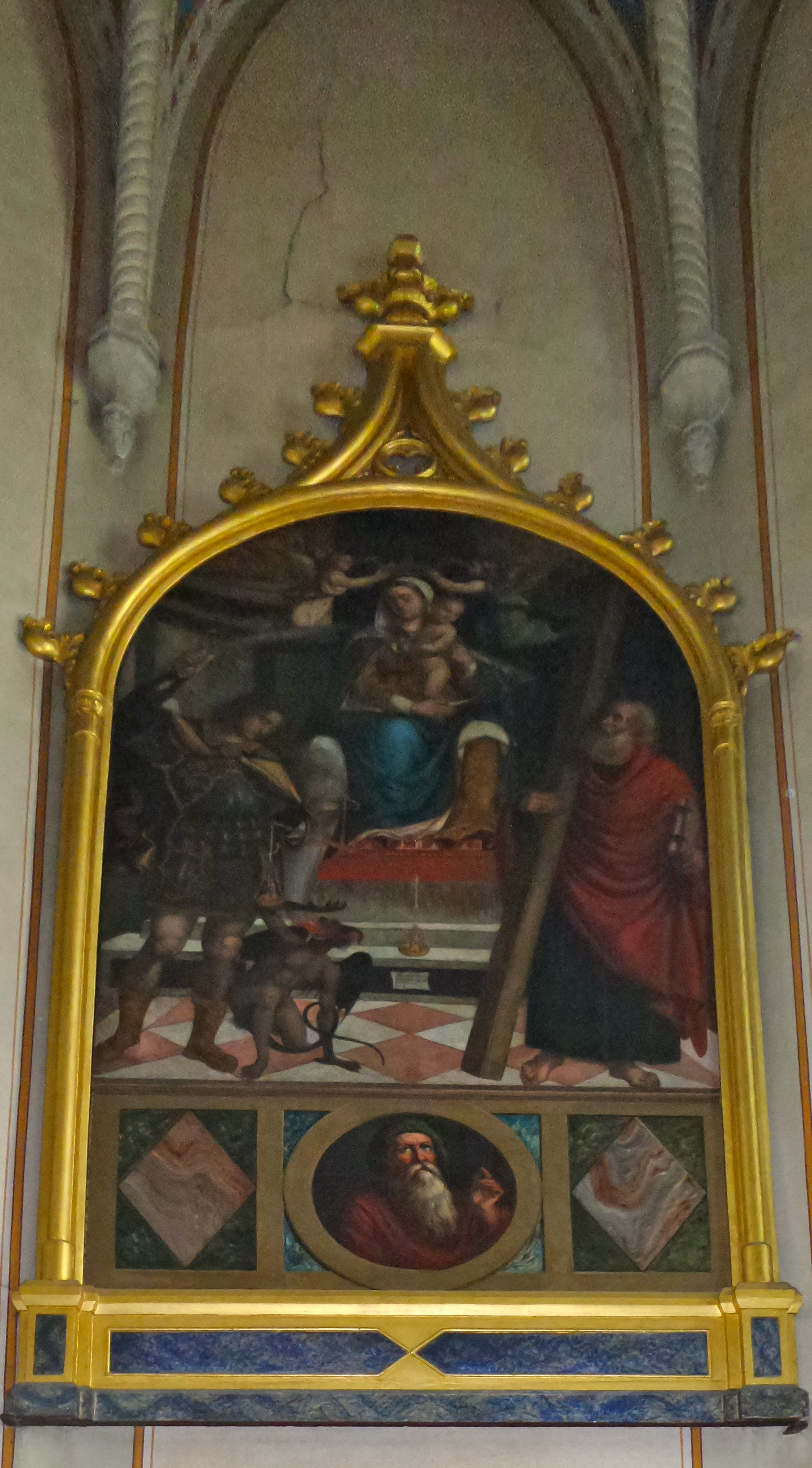 Pala cinquecentesca della chiesa di San Michele Arcangelo a Brendola